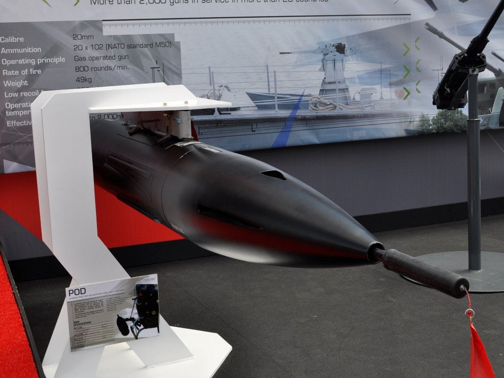 NC621 de Nexter Canon 20 mm embarqué sous la forme de nacelle, pour hélicoptères ou avions légers Variante de la famille M621 Photo prise au salon du Bourget 2011